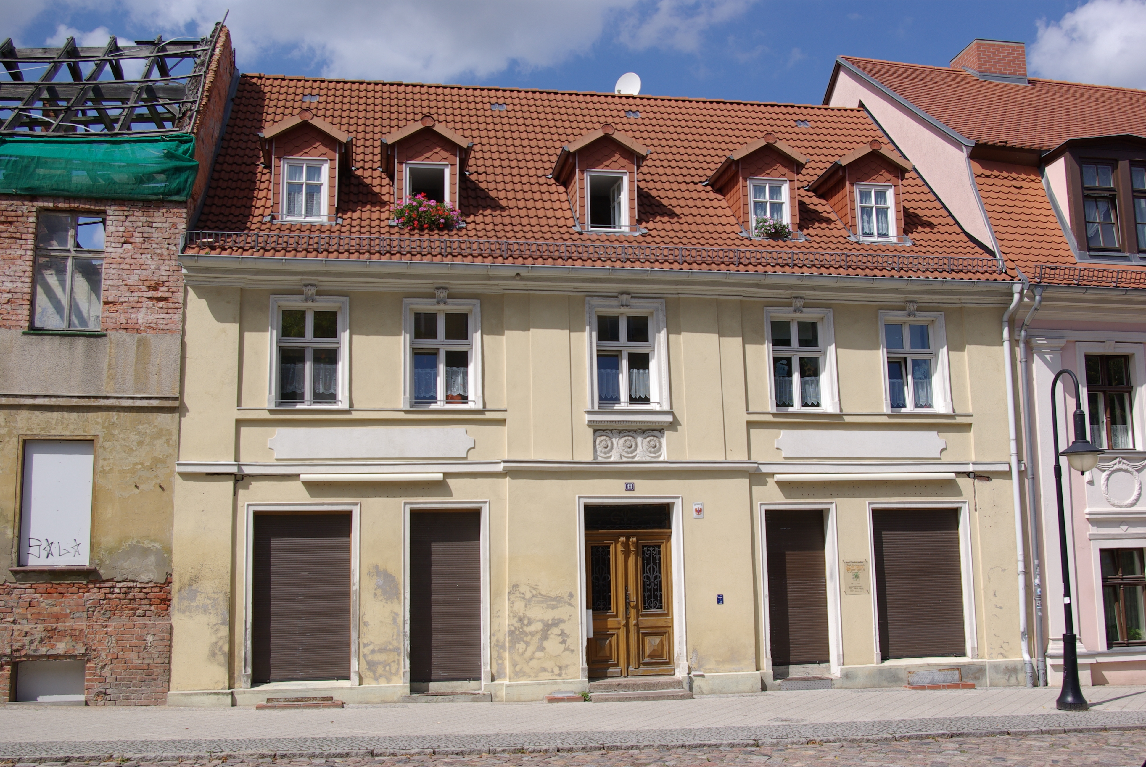 Bad Freienwald in Brandenburg. Das Haus in der Karl-Marxstrasse 13 steht unter Denkmalschutz.